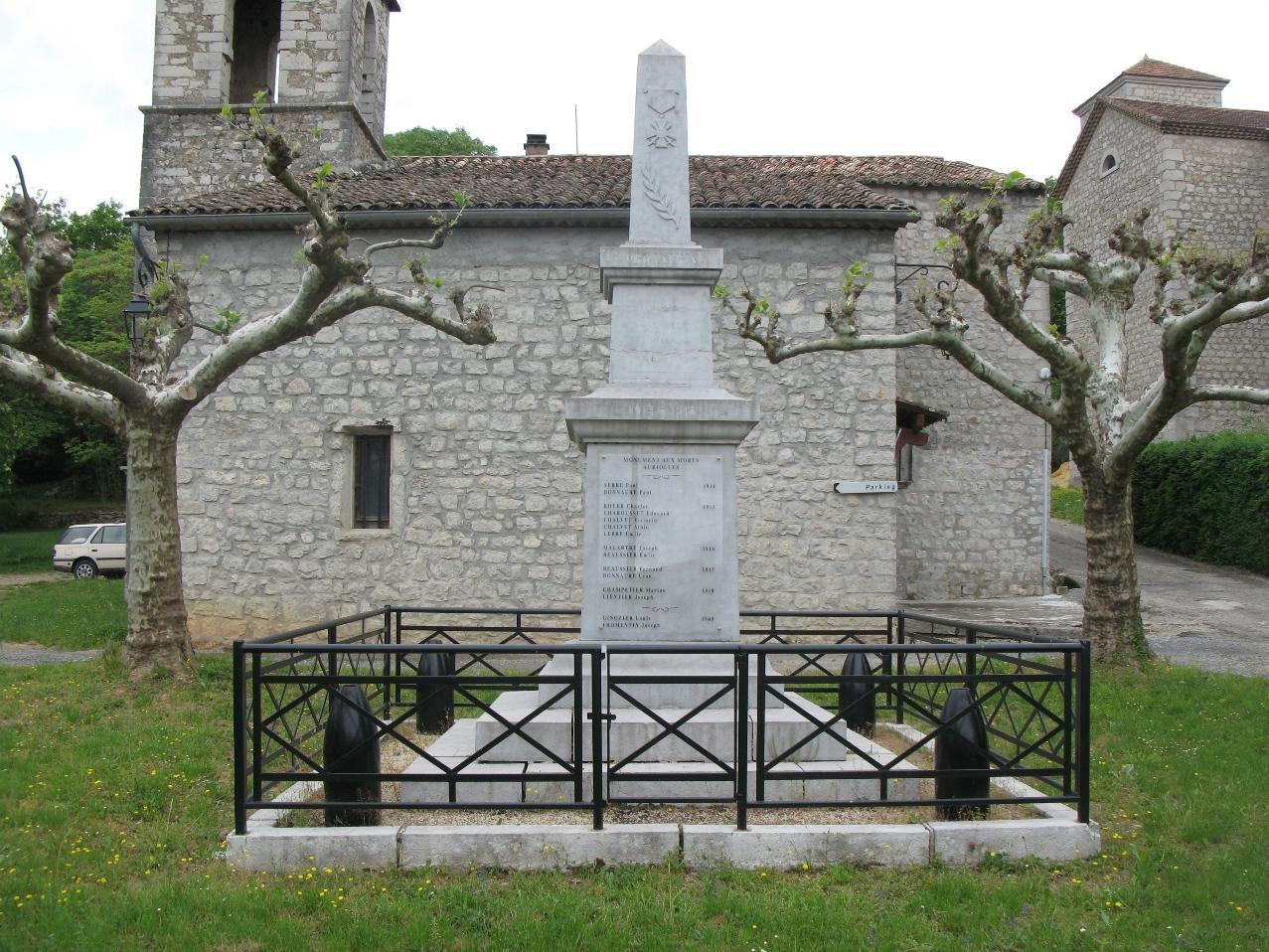 Monument aux morts de Auriolles (Saint-Alban-Auriolles)